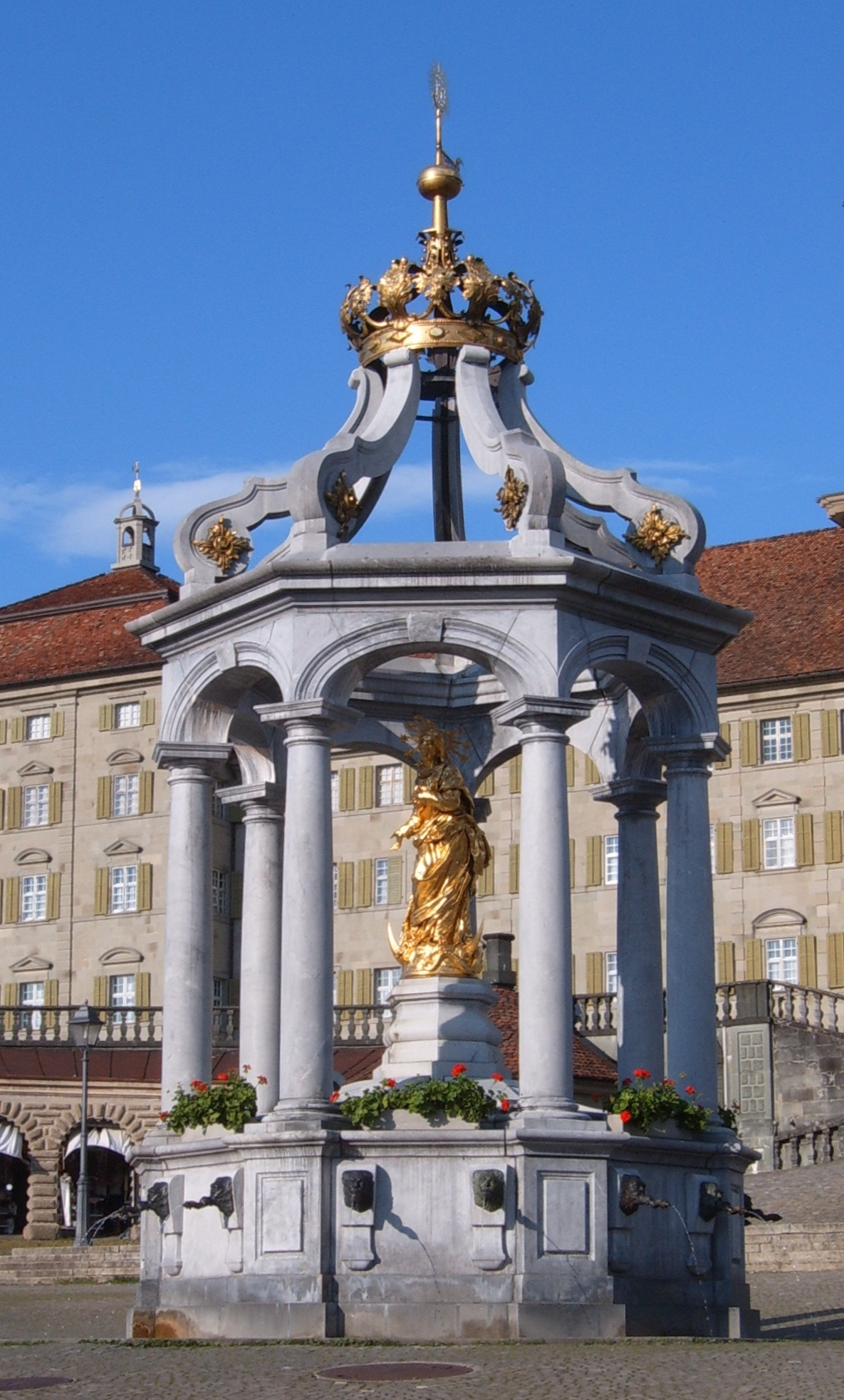 Lady Fountain, Einsiedeln Abbey, Canton of Schwyz (Switzerland)